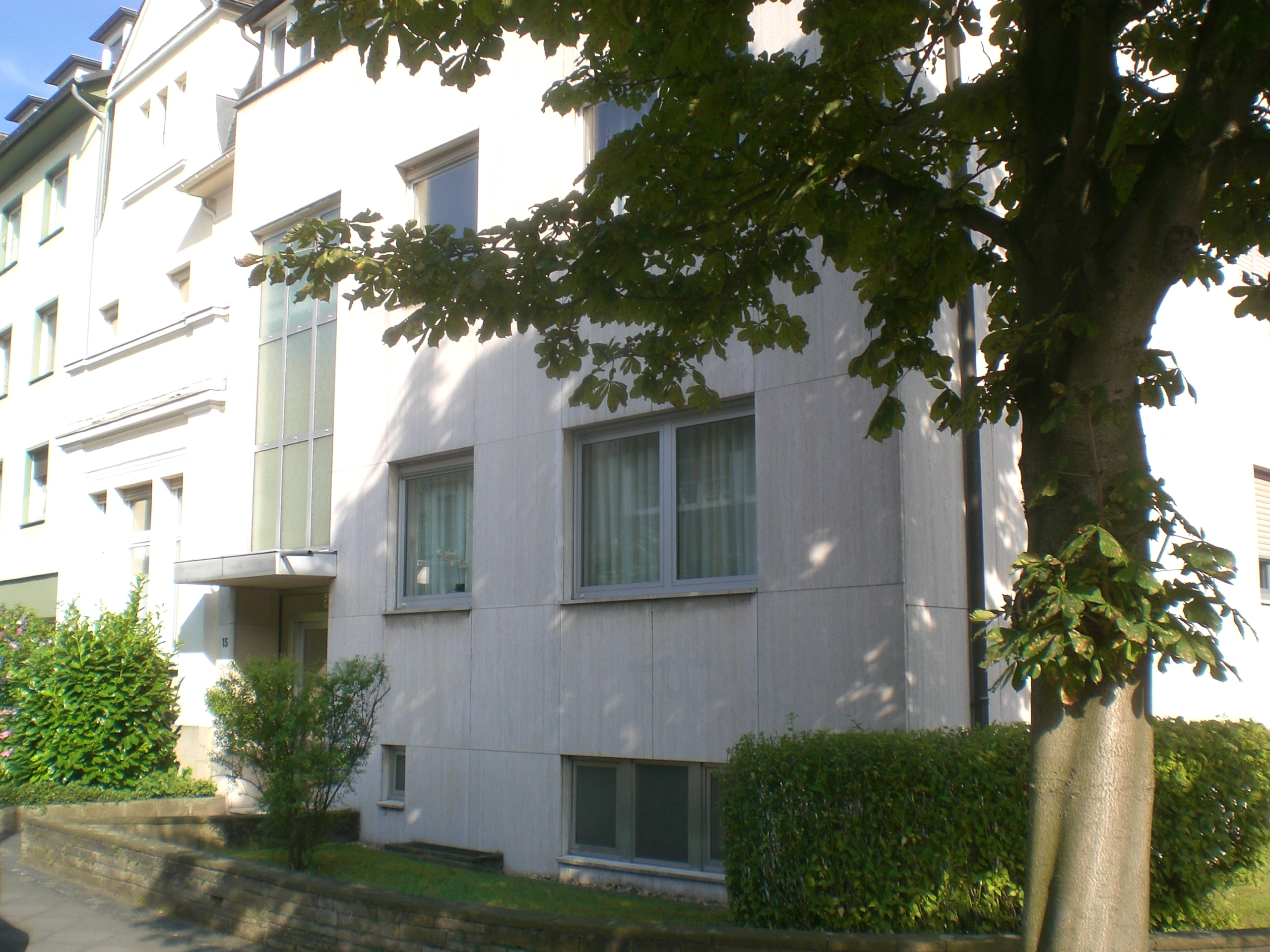 La ejo de la Germana Esperanto-Centro de 1987 ĝis 1995, nacia Esperanto-oficejo de Germana Esperanto-Asocio kaj Germana Esperanto-Junularo en Bonno, meze de la "federacia kvartalo", kie troviĝis tiam ĉiuj kaj nun parto de la registaraj institucioj de FRG, vidalvide al la muzeo pri historio de Germanio post 1945 (fotita la 31-an de julio 2008) Foto: Thomas Pusch